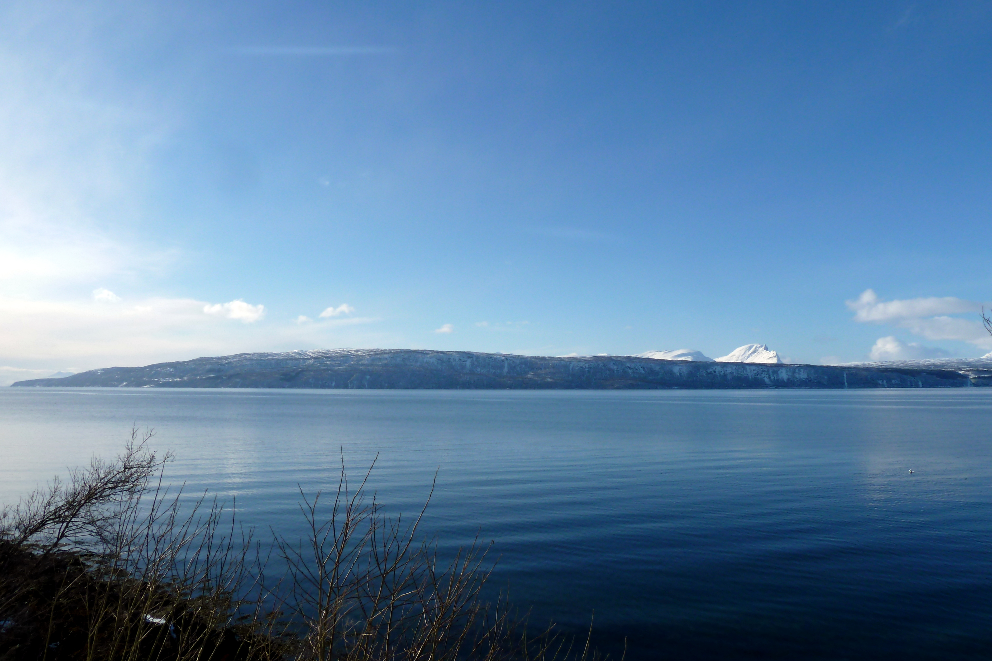 Veggfjellet i Narvik og Evenes, Nordland. Sett fra Narvik by.